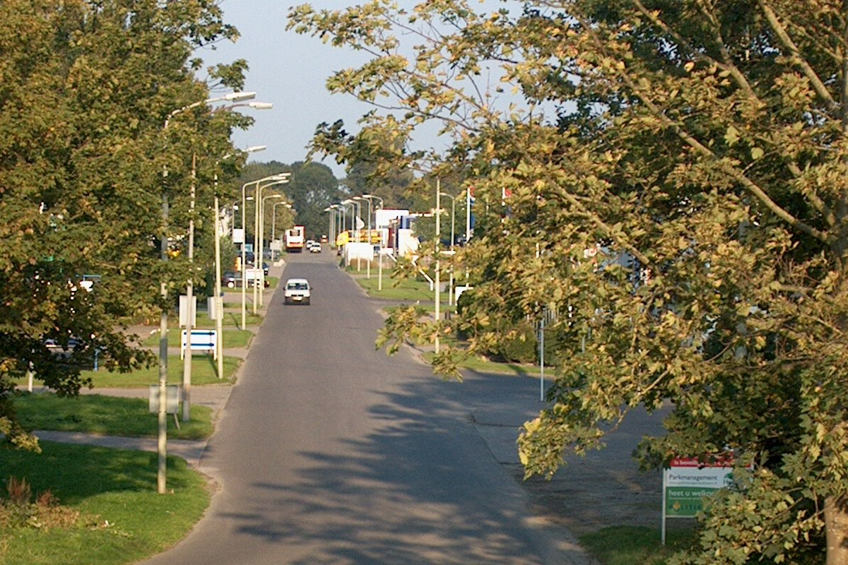 Industrieterrein "Hoorn '80", westelijke entree.